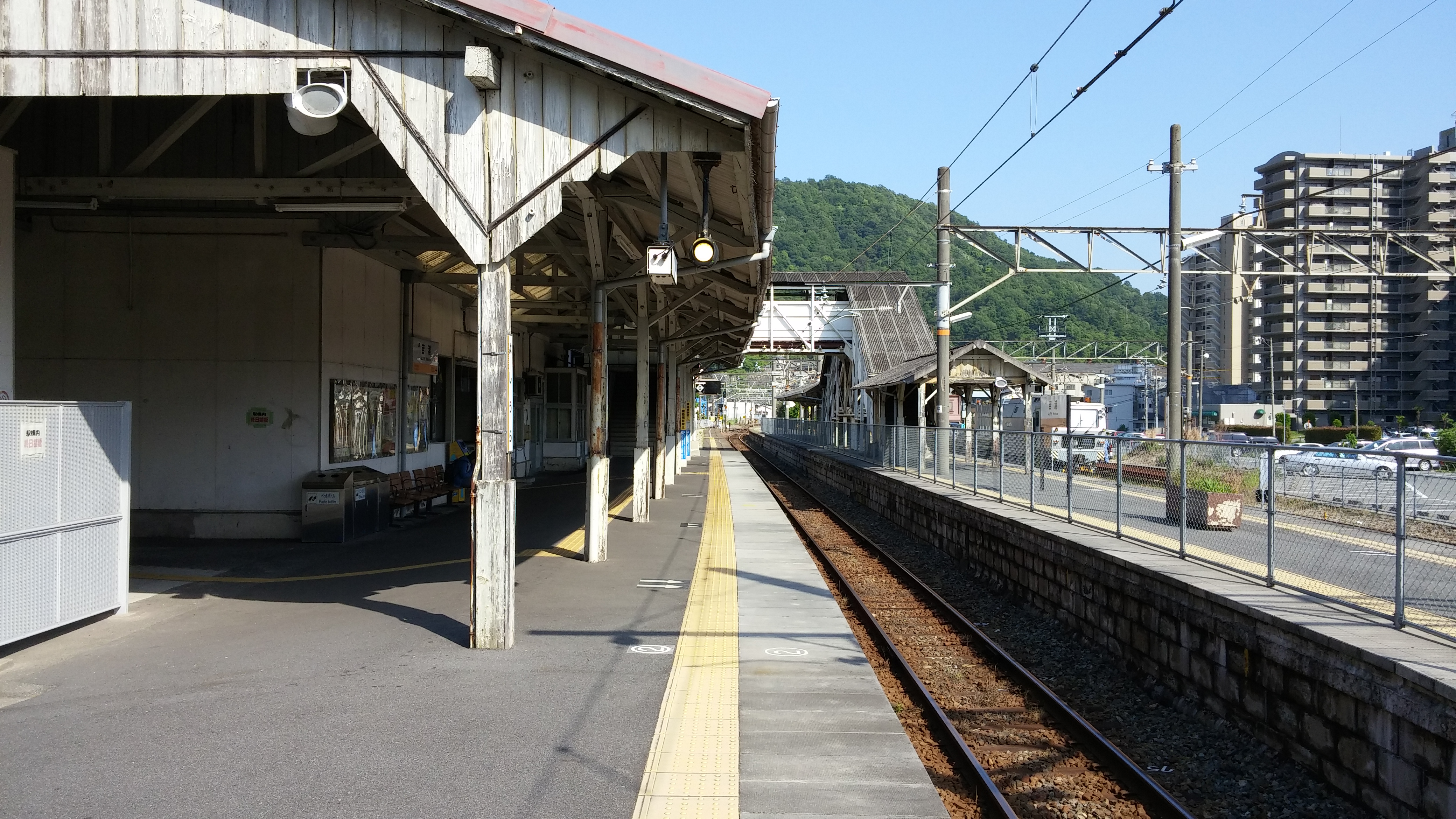 JR吉浦駅ホーム